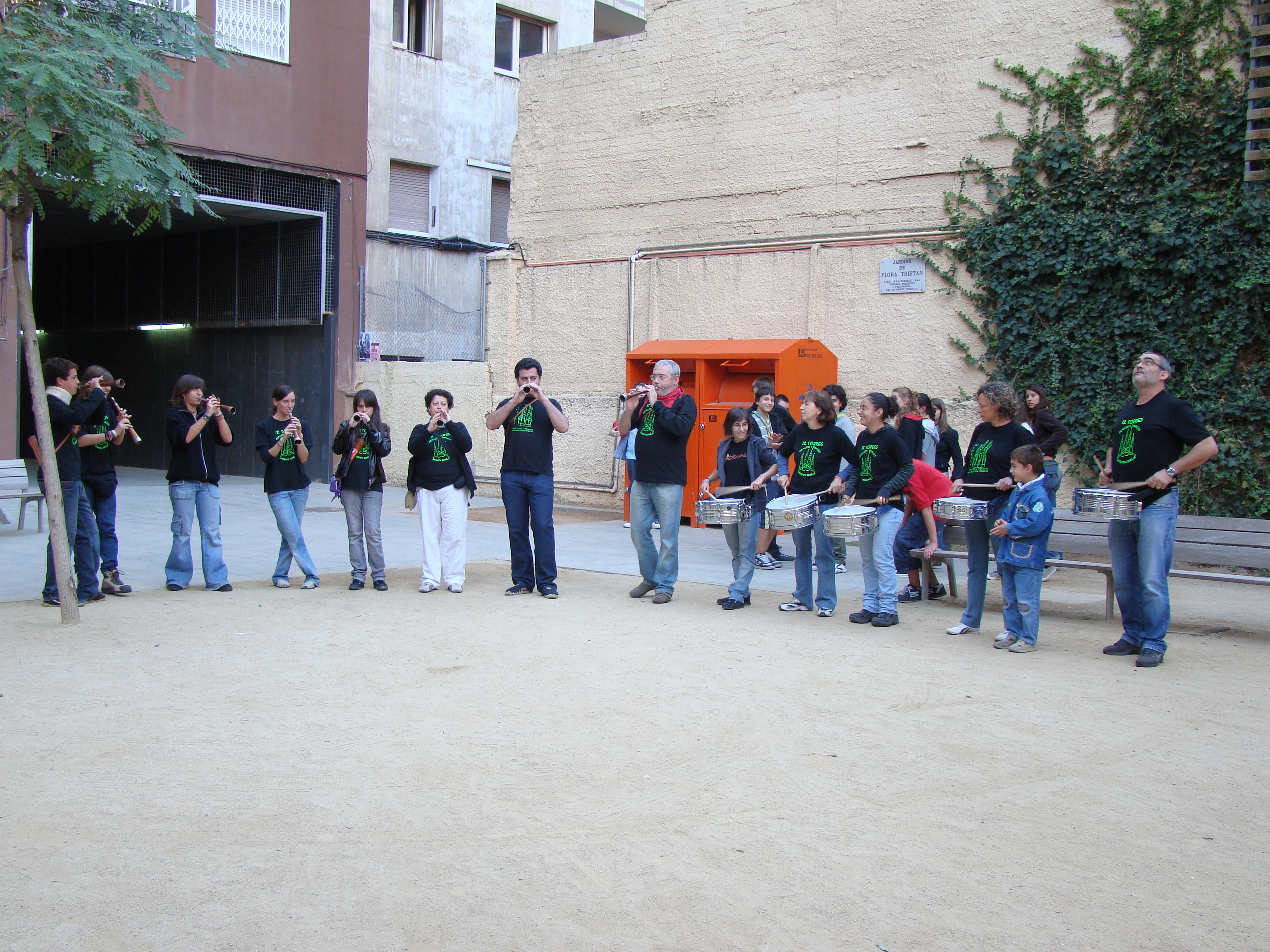 Les 12 Torres. Castellers de la Sagrada Família. Jardins de Flora Tristan.